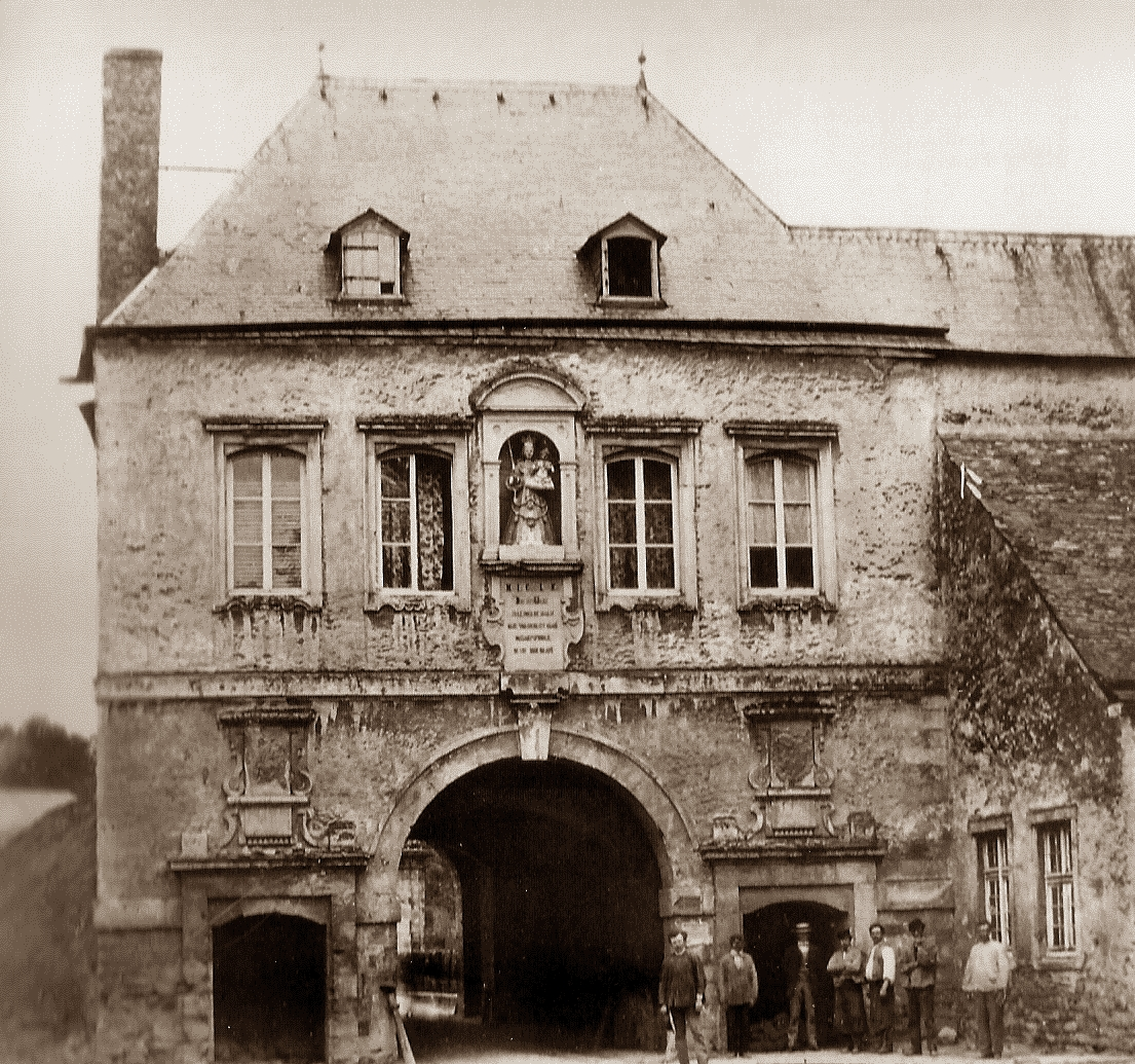 La Porte-Neuve avec la statue de "Notre-Dame de Consolation" vue du côté de la Ville, peu avant sa démolition.